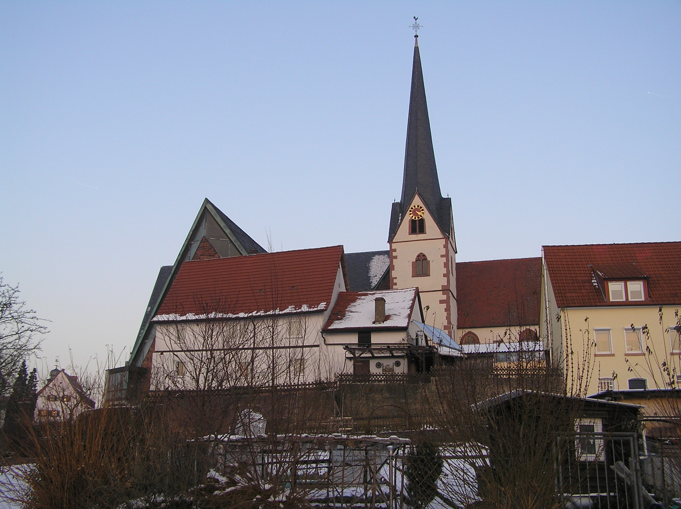 Die Erlenbacher Pfarrkirche St. Peter und Paul, vom Mainufer aus gesehen